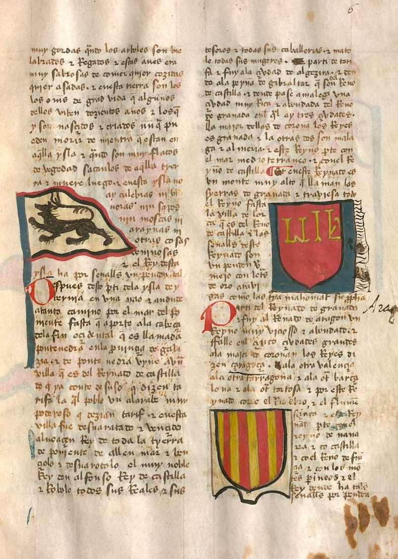 Libro del conocimiento ms. Z f. 6r